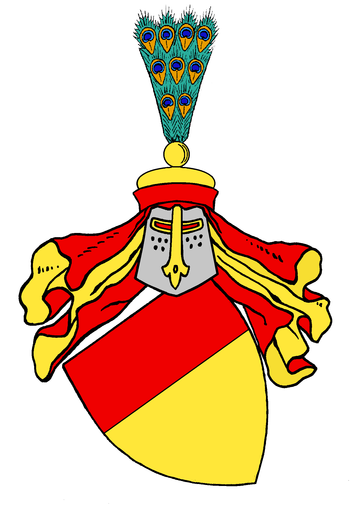 Stammwappen des bedeutenden Geschlechts der Reichsministerialen von Hagen-Münzenberg, das vorwiegend in der Wetterau und südlich von Frankfurt begütert war. Es wurde von den reichsgräf- und fürstlichen Hausern Falkenstein, Eppstein, Hanau, Solms und Hessen beerbt, die das Wappen in ihr jeweiliges Wappen aufnahmen. Eine Wappenverwandtschaft besteht zu den alten Grafen von Schwerin, deren Dynastie ihre Stammreihe mit Gunzelin von Hagen begann.